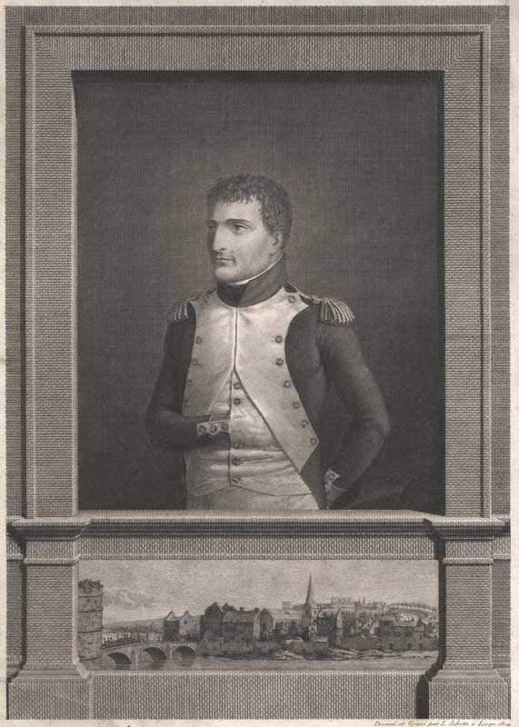 Napoléon Ier (1804), par Léonard Jehotte